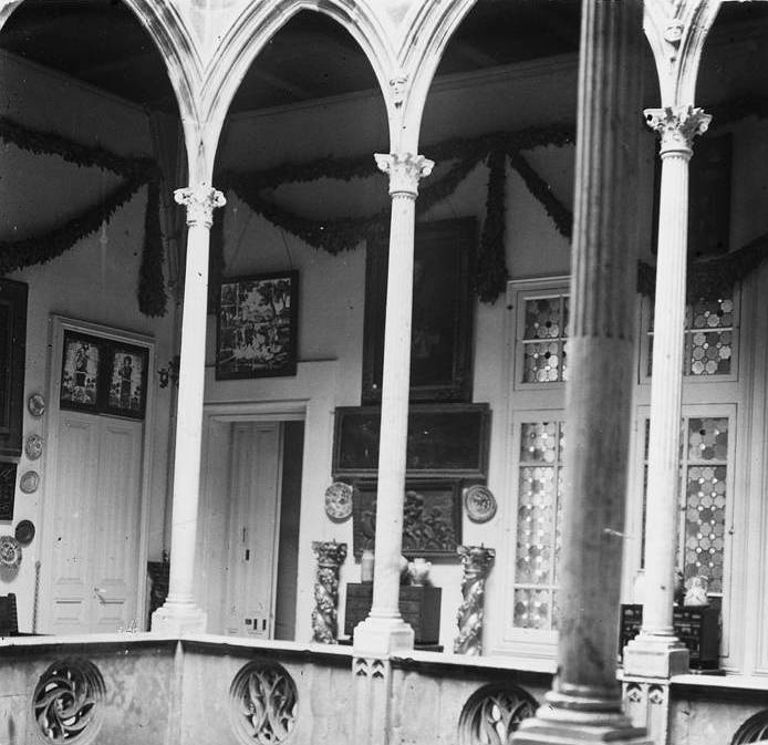 Columnes i arcs de casa Gralla. Josep Salvany i Blanch (1914)